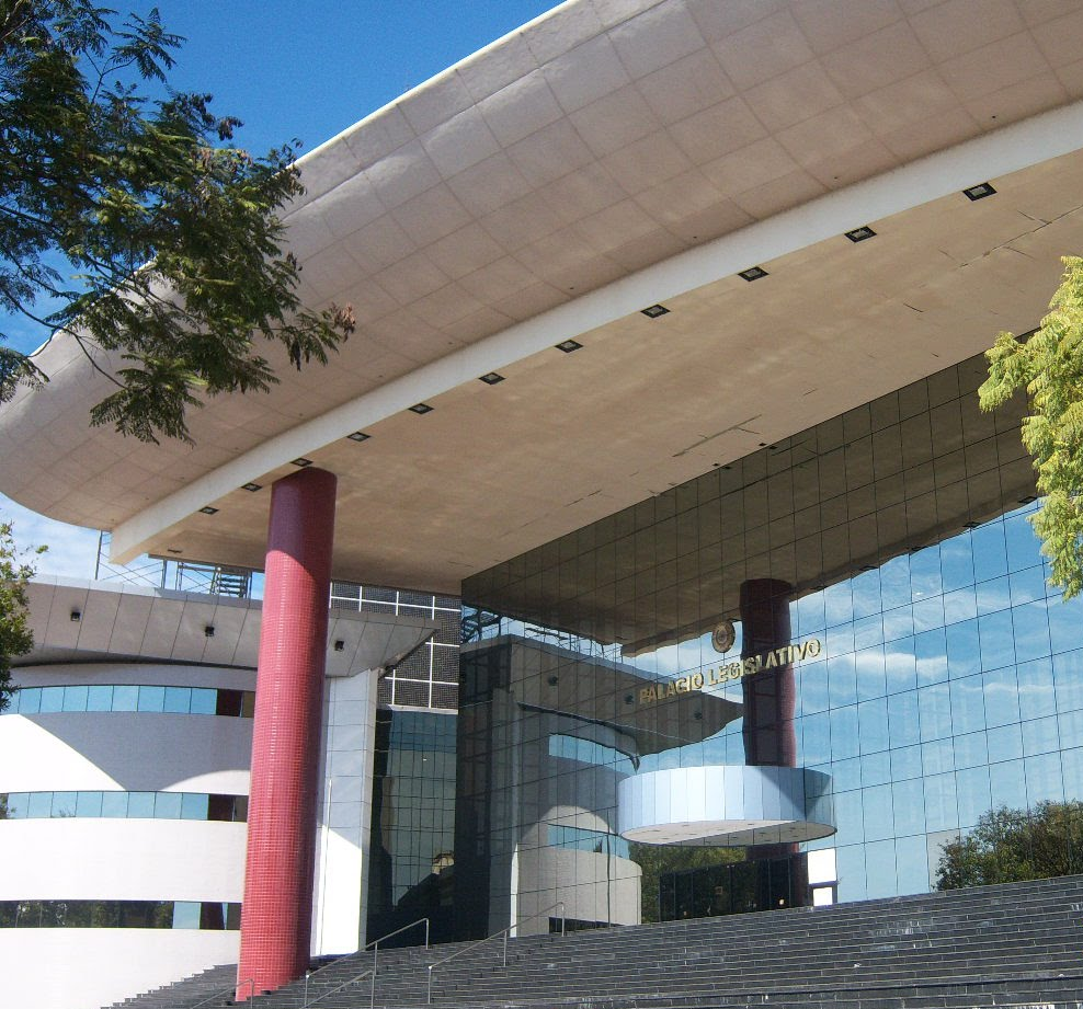 Palacio Legislativo Paraguay